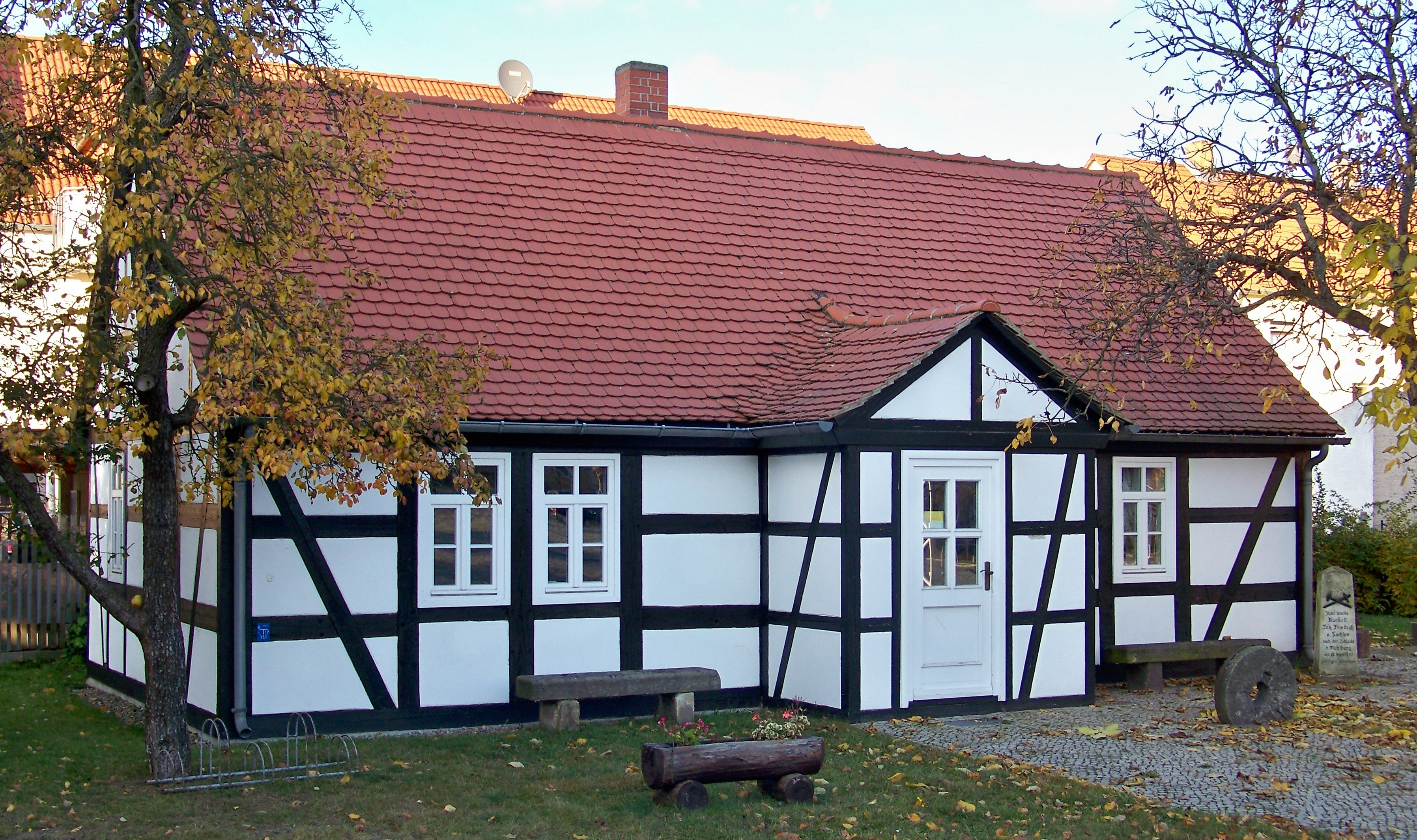 Naturkundliche Heimatstube in Falkenberg (Elster)